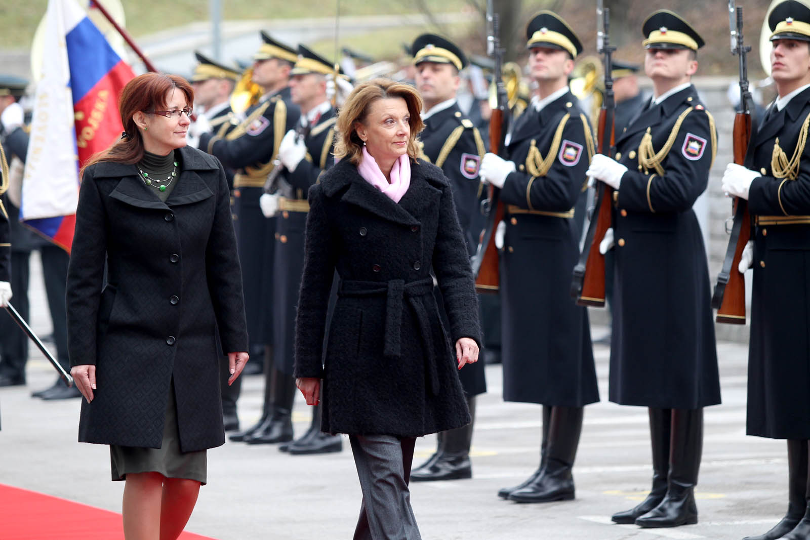 Na uradnem obisku v Sloveniji ministrica za obrambo Črne gore dr. Milica Pejanović-Đurišić.